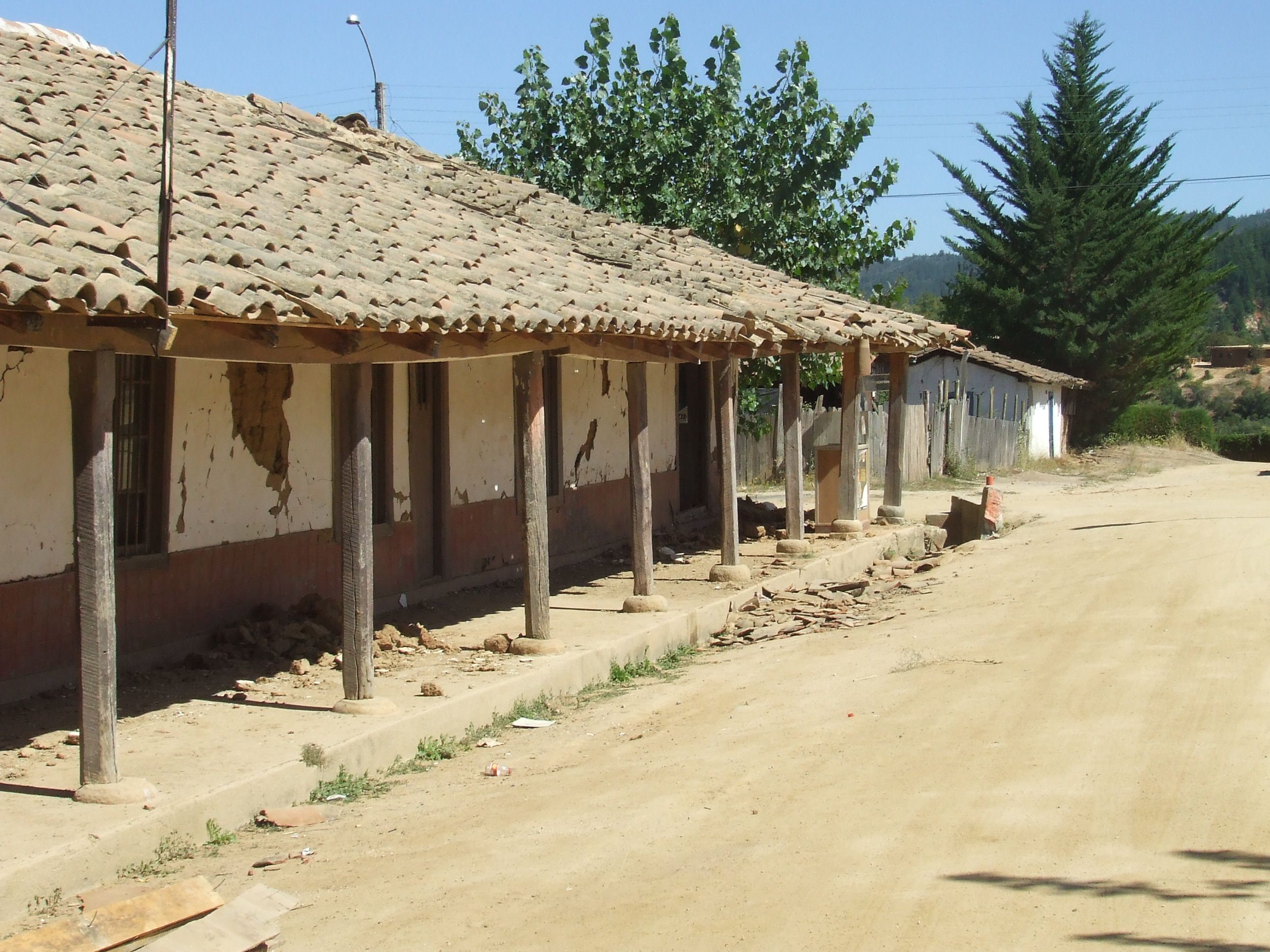 Casa de adobe en Nirivilo, VII Región del Maule, destruida por el terremoto de Chile de 2010.